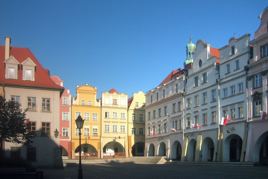 Jelenia Góra, Polska: Plac Ratuszowy